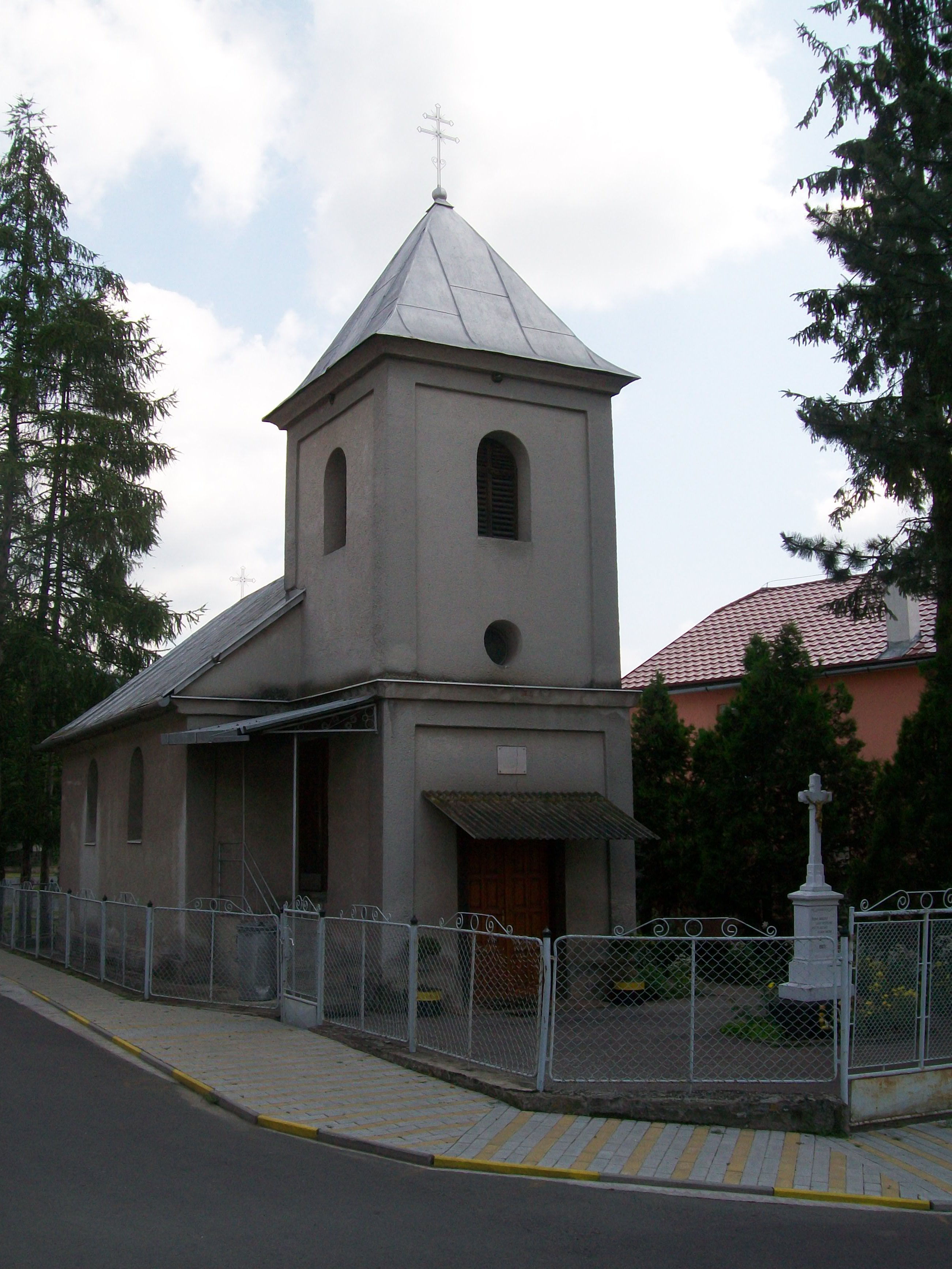 V obci Bulhary postavili kostolík roku 1849 a je zasvätený Všetkým svätým